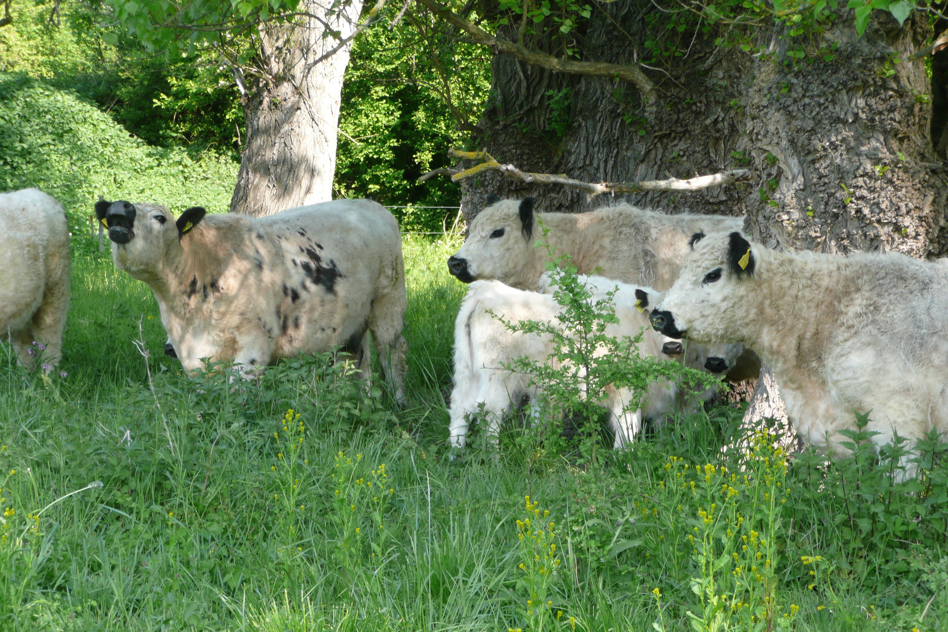 Worms-Ibersheim, Wörth, Galloway-Rinder